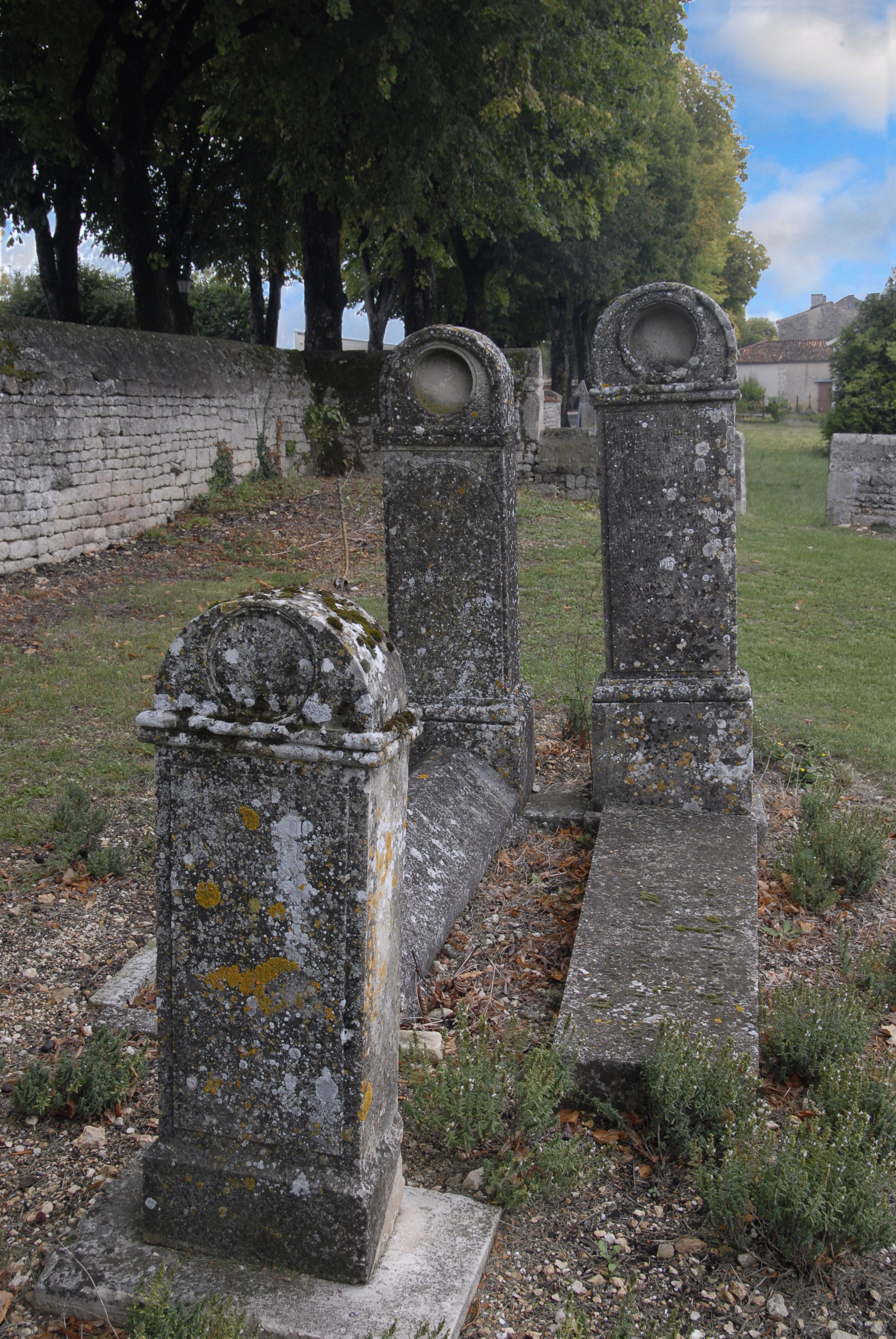 St.-Pierre Aulnay, Friedhof, Grabsteine mit Stelen